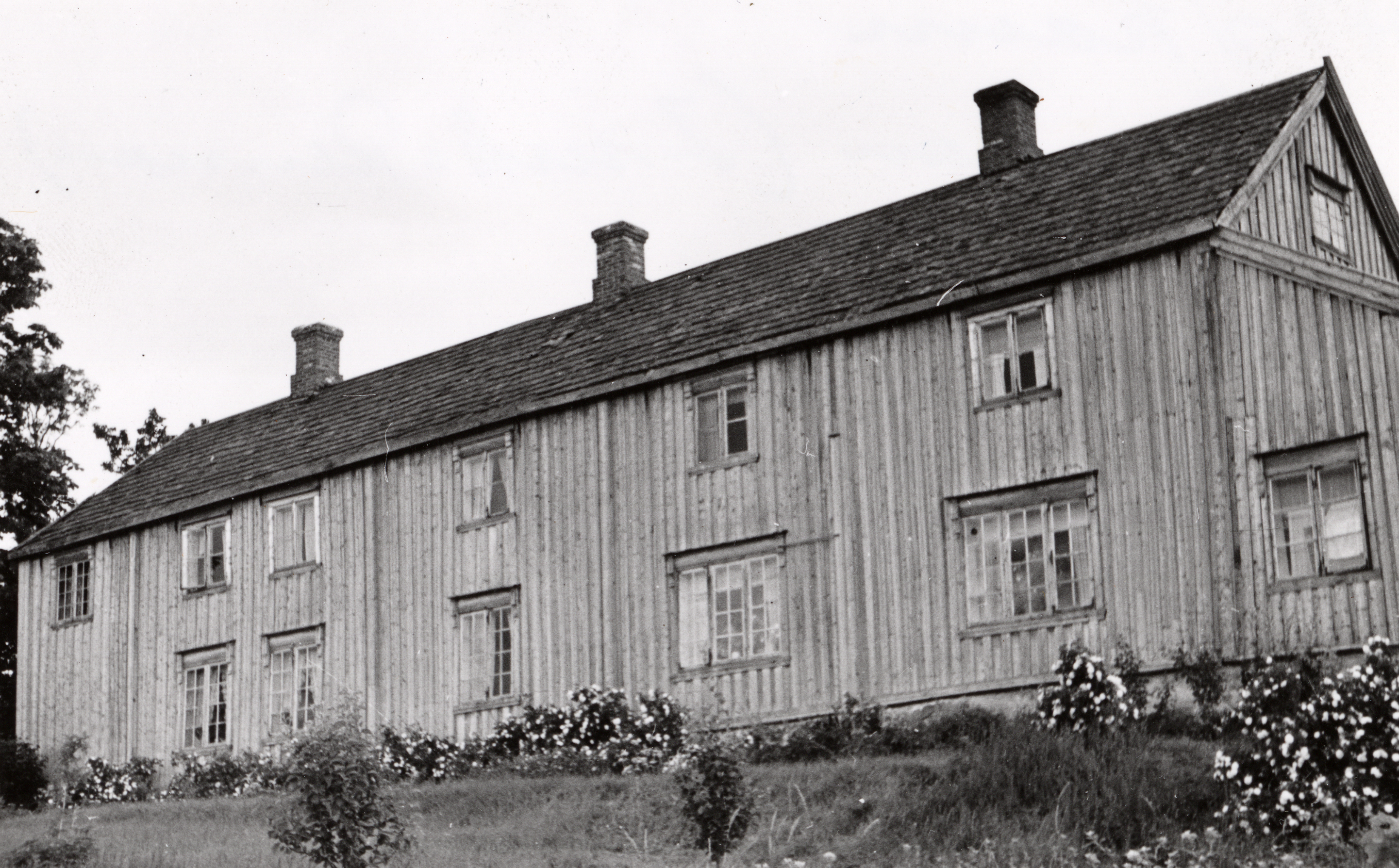 Renden Øvre i Alstadhaug, Nord-Trøndelag «Zinkrennan» This image on crowdsourcing geotagging platform Fotodugnad